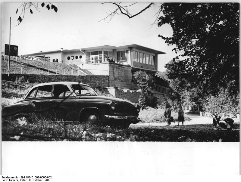 Gera, Burgruine Osterstein, Terassencafé Zentralbild Liebers 8.10.1964 Neues Terrassencafe in Gera übergeben. 500 Plätze bietet das neue Terrassencafe auf der Burgruine Osterstein in Gera, das zum 15. Jahrestag der DDR der Bevölkerung übergeben wurde. Für den Bau wurden über eine Million Mark aufgewendet. Darüber hinaus beteiligten sich die Geraer Einwohner noch mit 25000 NAW-.Stunden.n